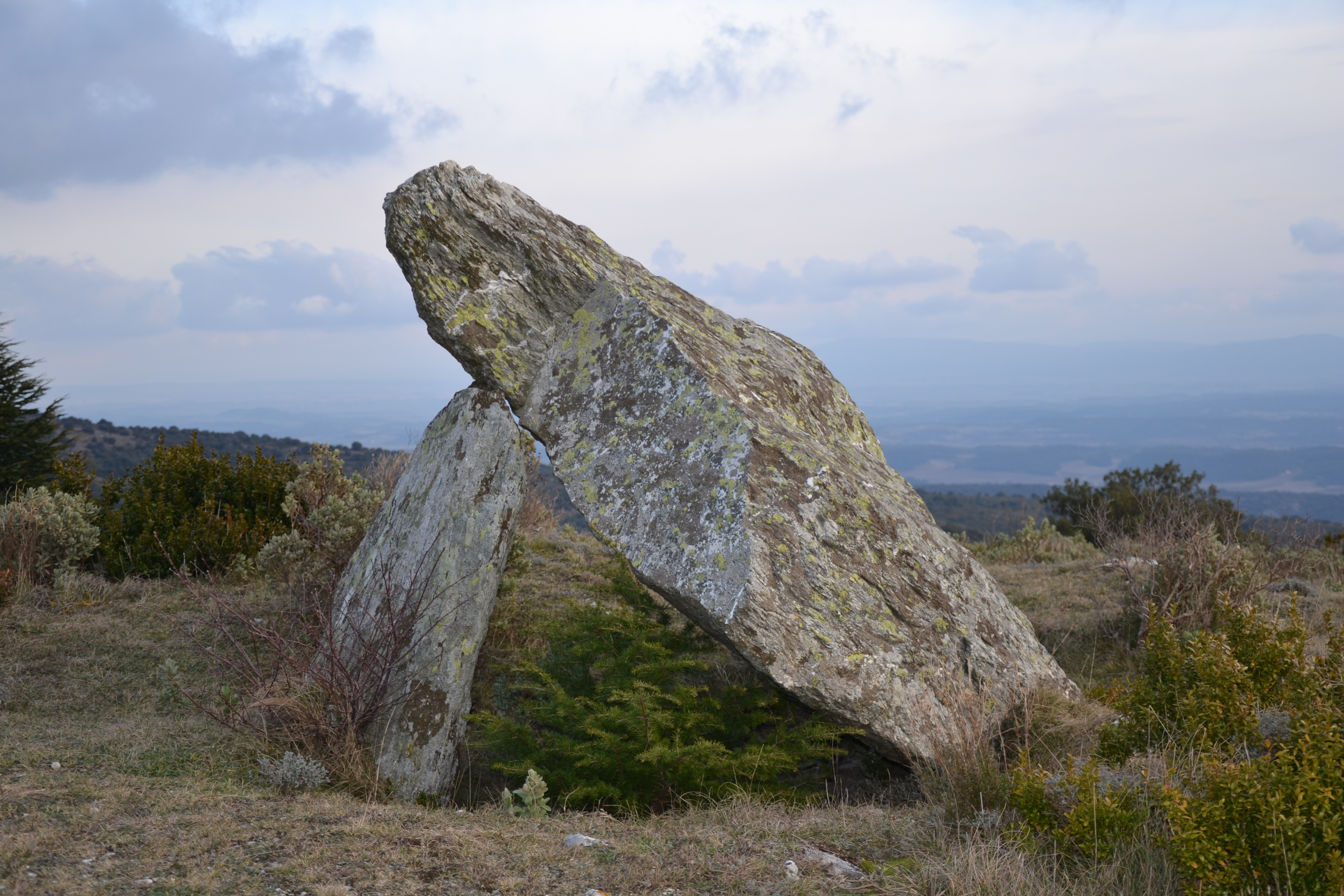 Dolmen proche du village de Fournes-Cabardès